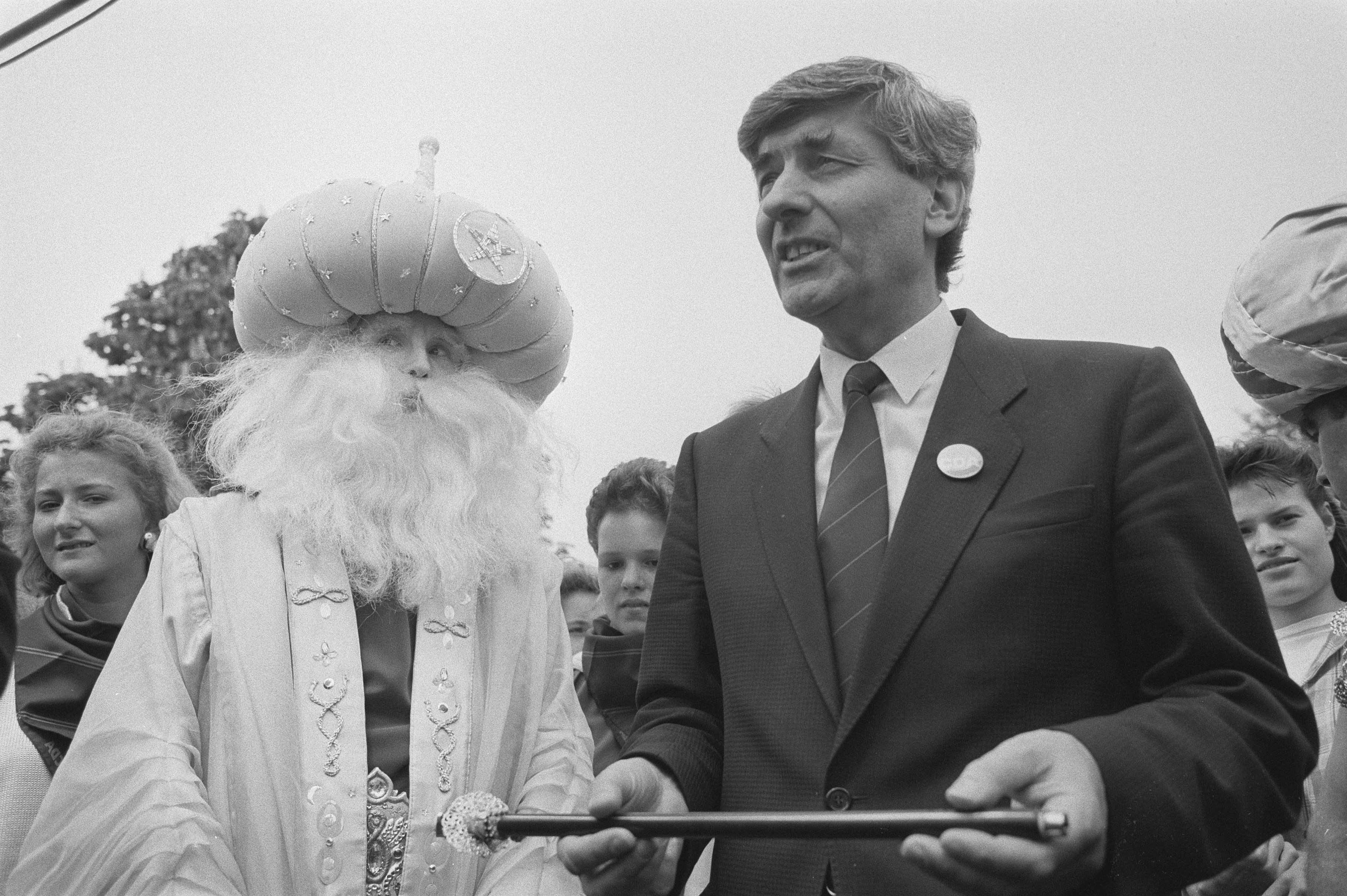 Collectie / Archief : Fotocollectie Anefo Reportage / Serie : [ onbekend ] Beschrijving : Premier Lubbers krijgt, op verkiezingstoernee in de Efteling, een toverstaf Datum : 17 mei 1986 Trefwoorden : premiers, verkiezingen Persoonsnaam : Efteling, Lubbers, Ruud Fotograaf : Gerrits, Roland / Anefo Auteursrechthebbende : Nationaal Archief Materiaalsoort : Negatief (zwart/wit) Nummer archiefinventaris : bekijk toegang 2.24.01.05 Bestanddeelnummer : 933-6586